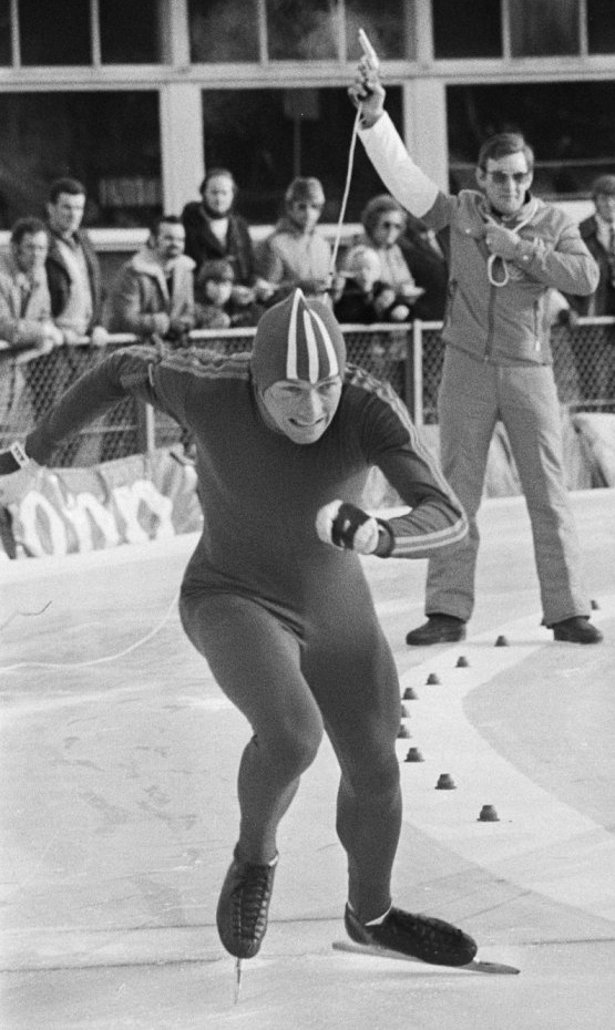 Jos Valentijn